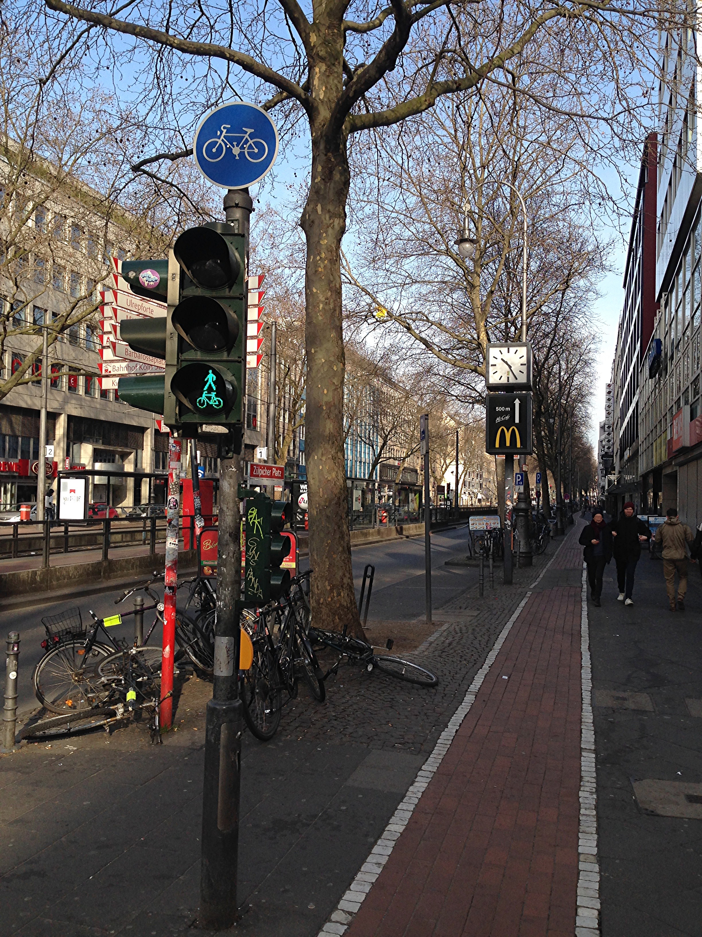 Nördlicher Radweg am Kölner Hohenstaufenring